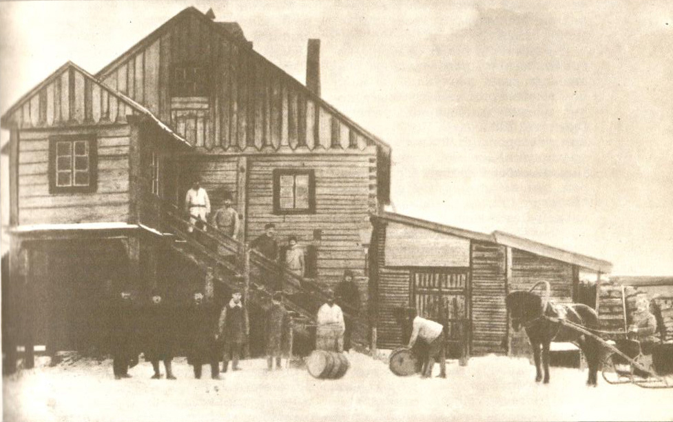 Беларуская (тарашкевіца): Менск (Miensk), Камароўка (Kamaroŭka). Крухмальна-патачны завод братоў Трэпель